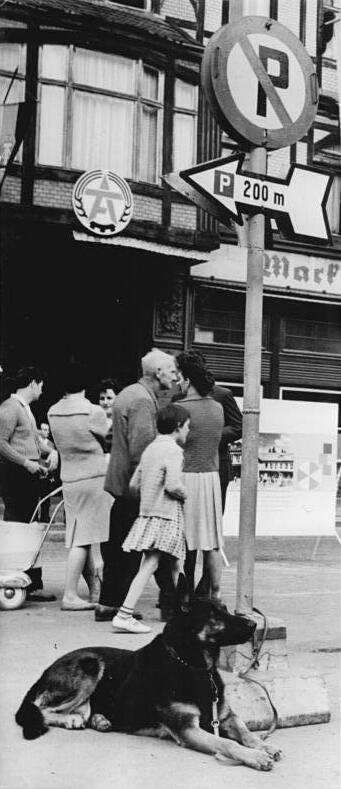 Straßenszene Zentralbild Eckleben Eckl-Pr 5.7.1961 Für Autos- es hat seine Not- gibt´s überall ein Parkverbot. Wie wär´s - ich frag den ABV- mit Parkverbot für den Wau-Wau?